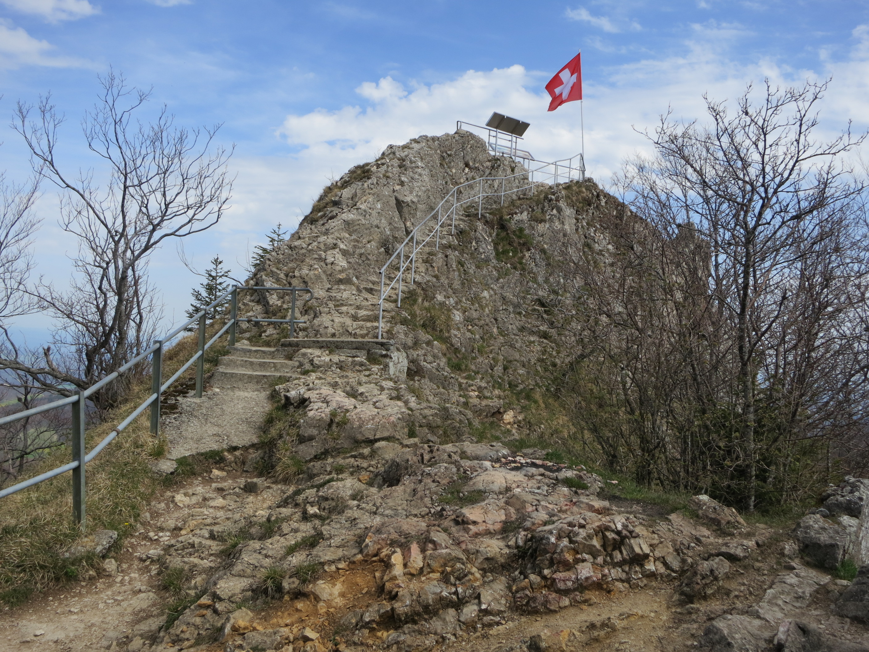 Belchenflue, Schweiz